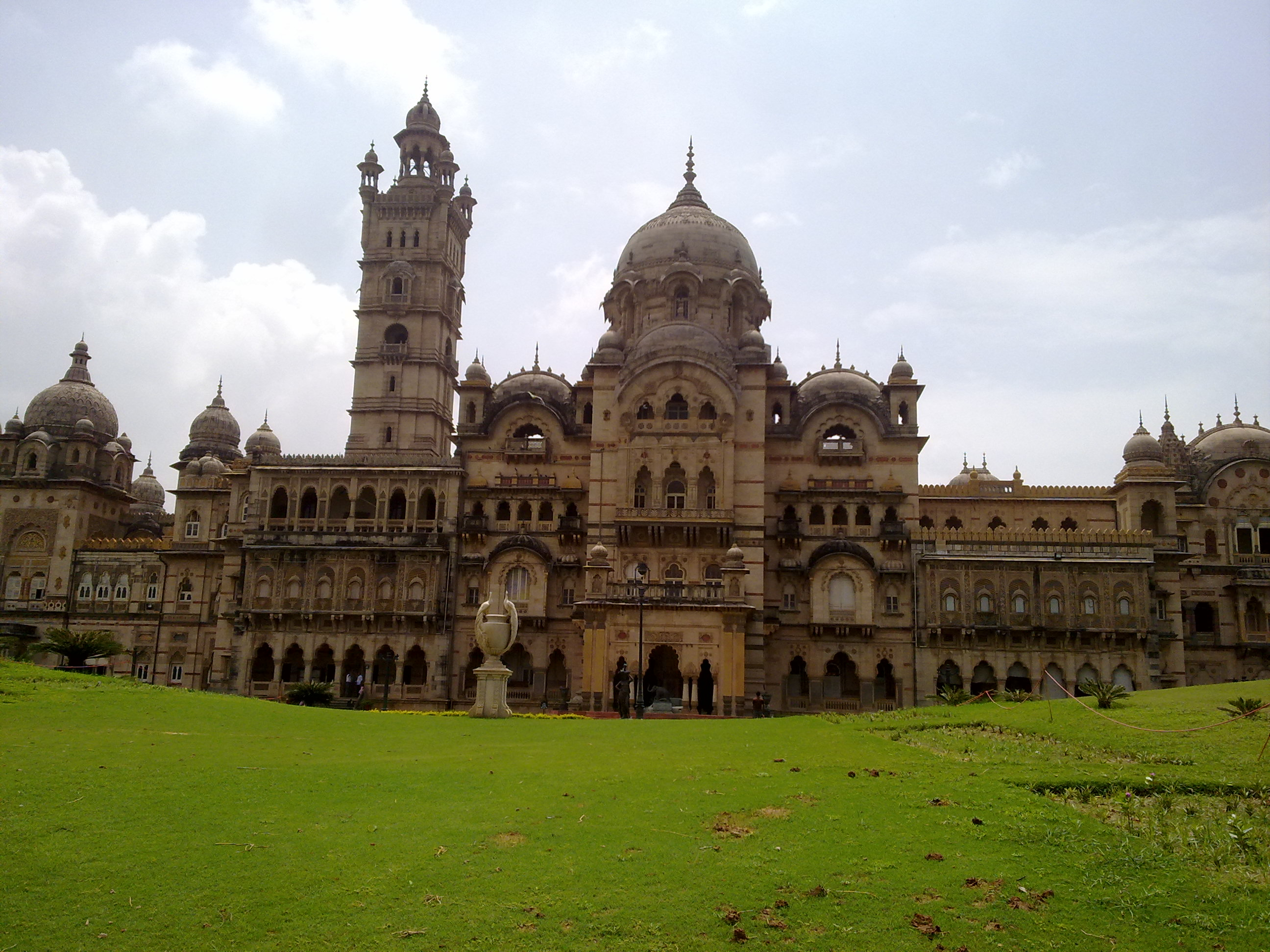 At Laxmi Vilas Palace, Vadodara India